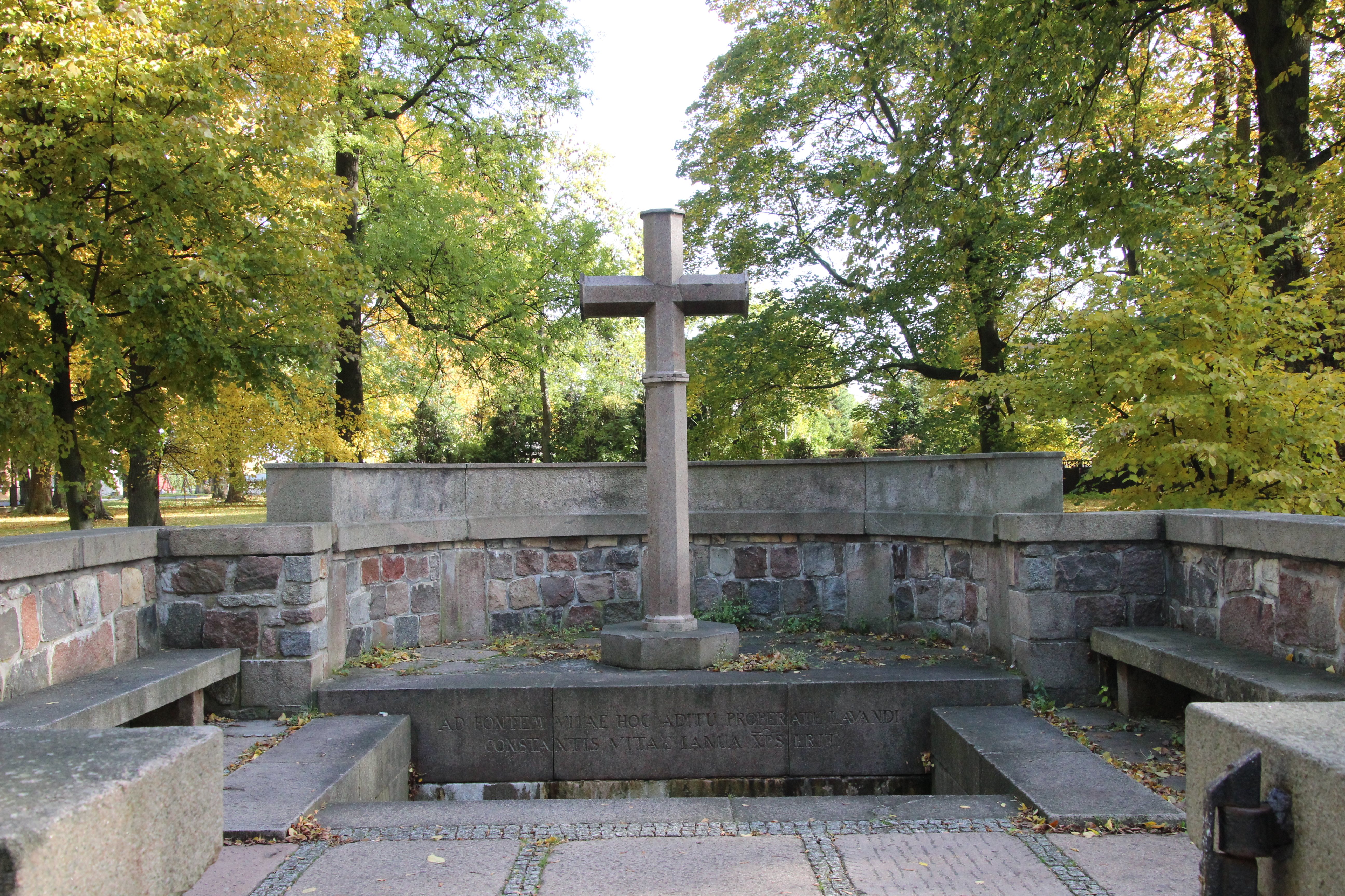 Pyrzyce (deutsch Pyritz) - Hl. Quelle - Hl. Otto-von-Bamberg-Brunnen